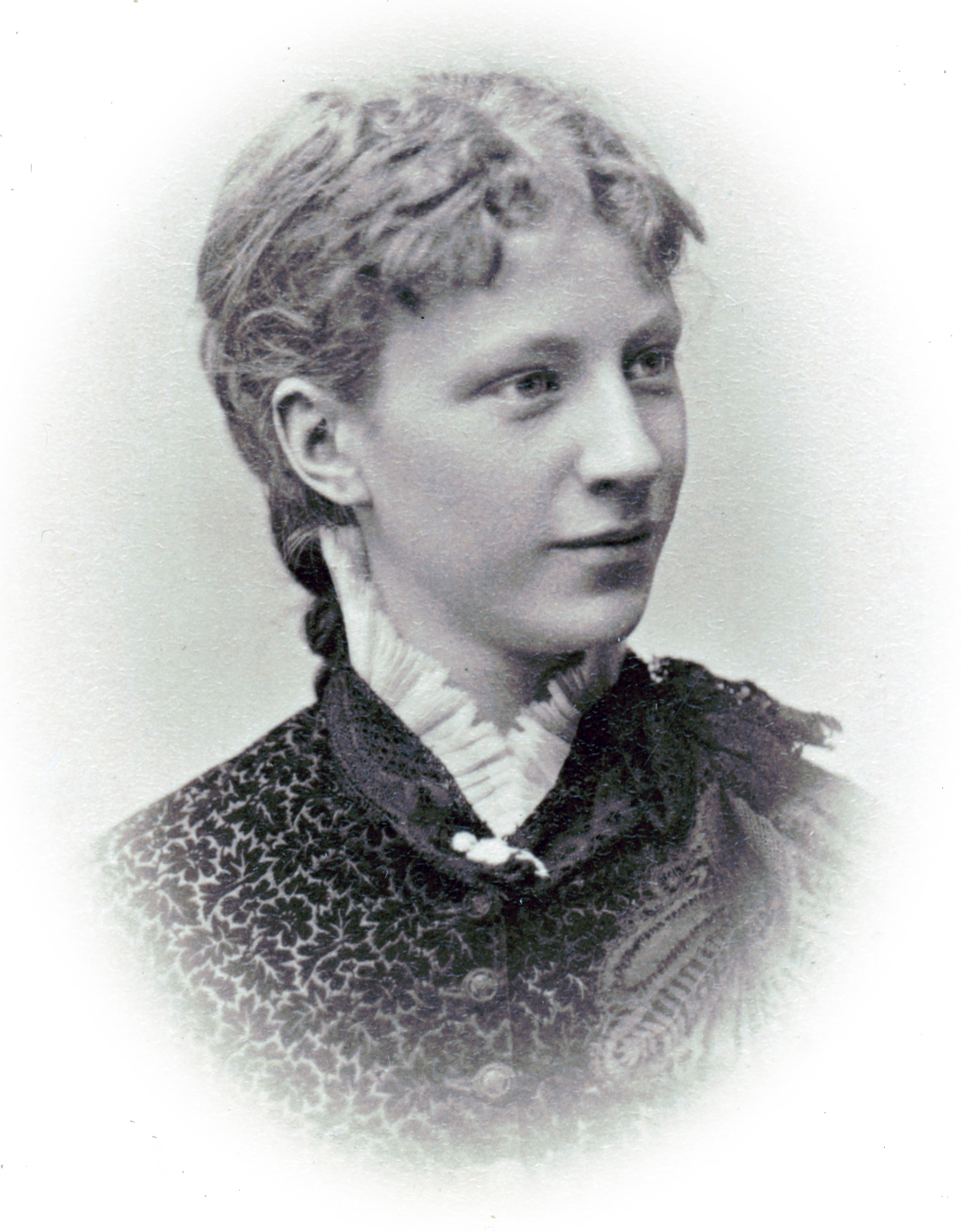 Gina Oselio, sångare vid Kungliga Operan 1880, Hette egentligen Ingeborg Ås